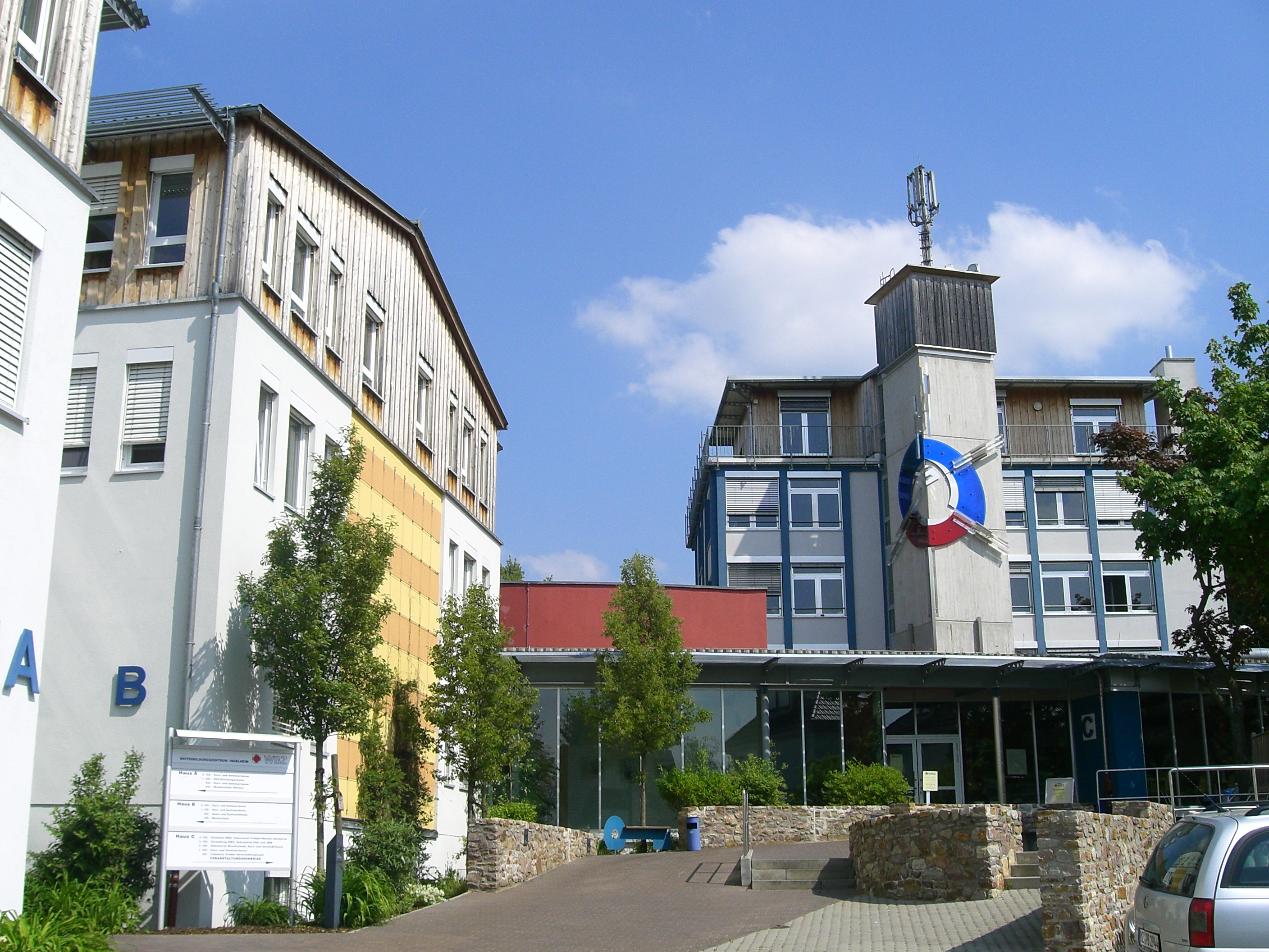 Das ursprüngliche Weiterbildungszentrum Ingelheim (WBZ), ein integriertes Kultur- und Bildungszentrum mit den Fachbereichen Volkshochschule, Musikschule, Jugendbildungswerk und Fridtjof-Nansen-Akademie für politische Bildung. Seit April 2017 betreibt das WBZ ein neues Bildungshaus am Neuen Markt 3.